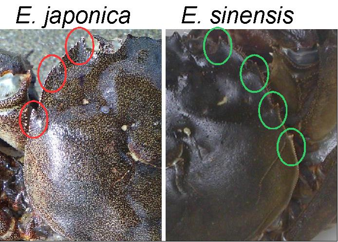 Eriocheir japonica and E. chinensis モクズガニとチュウゴクモクズガニの比較